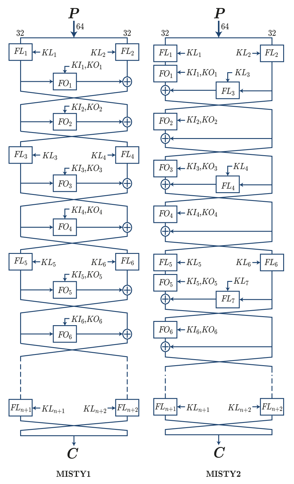 תרשים צופן MISTY